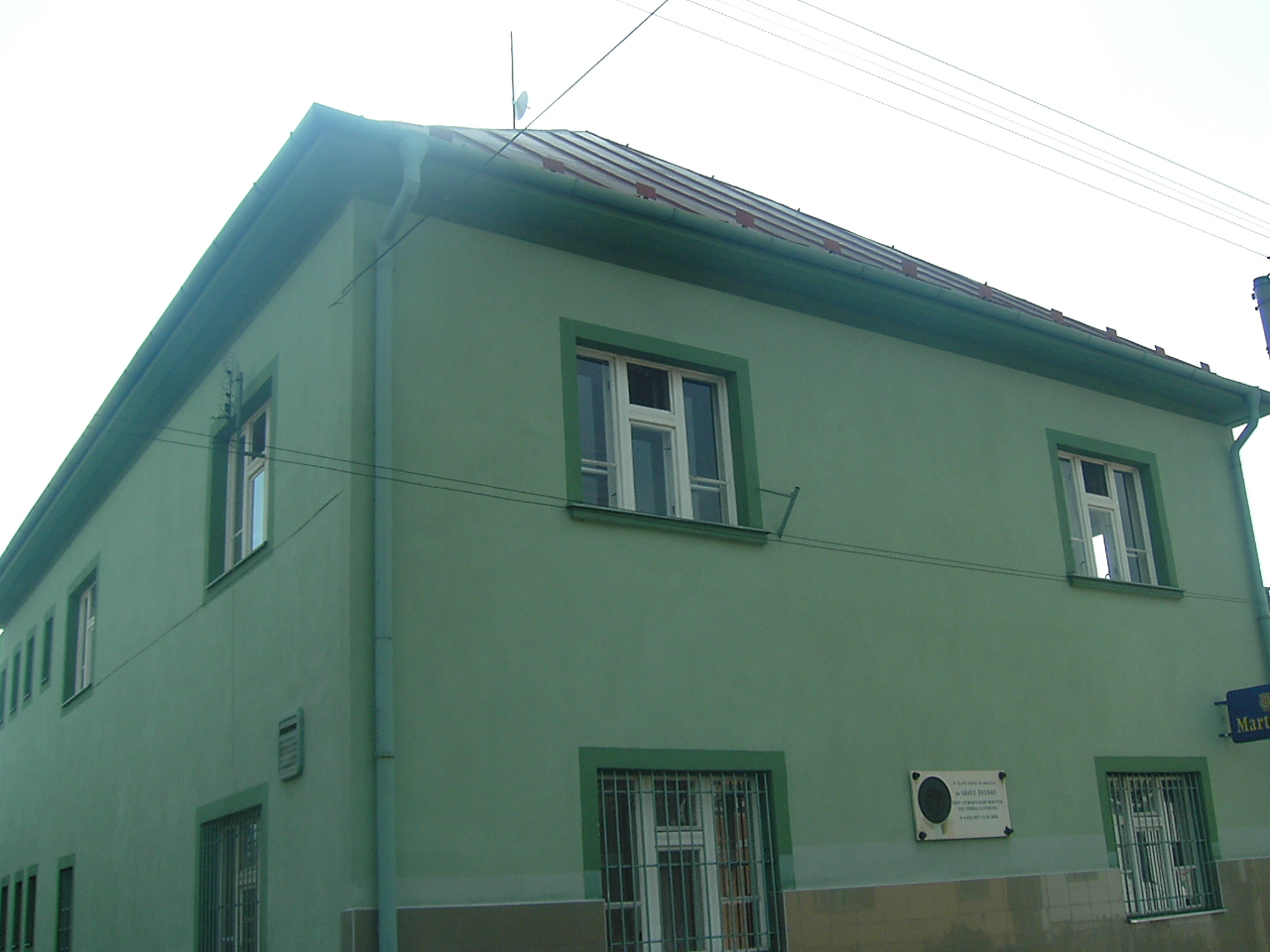 Vavro Srobar's house